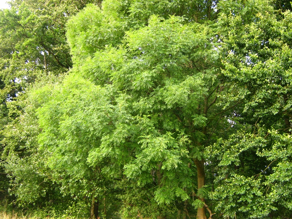 Eine Gemeine Esche (Fraxinus excelsior) am Waldrand (Trauf) bei Völkshagen im Landkreis Nordvorpommern, Mecklenburg-Vorpommern.